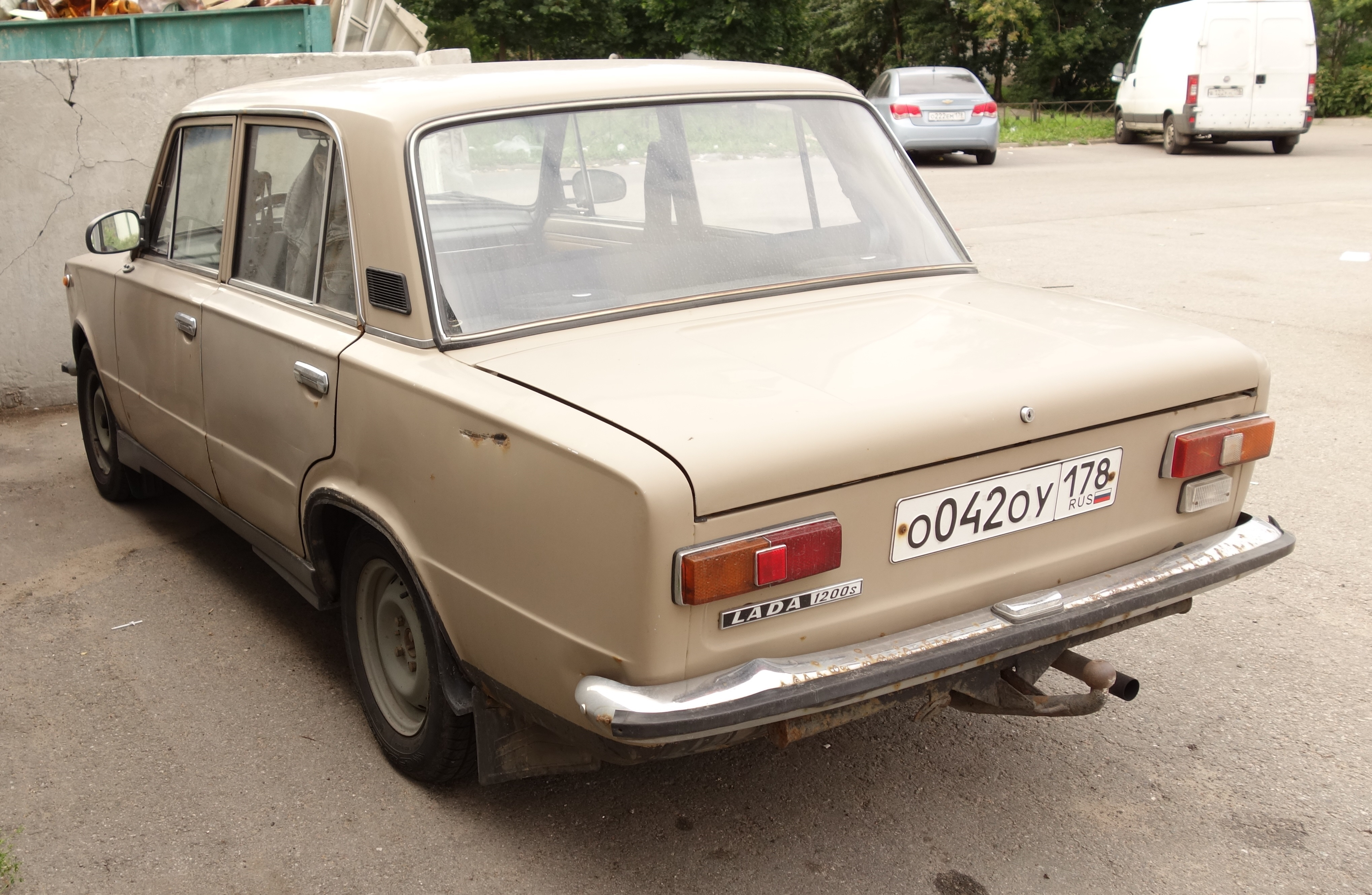 Lada VAZ-2101 in Sankt Petersburg